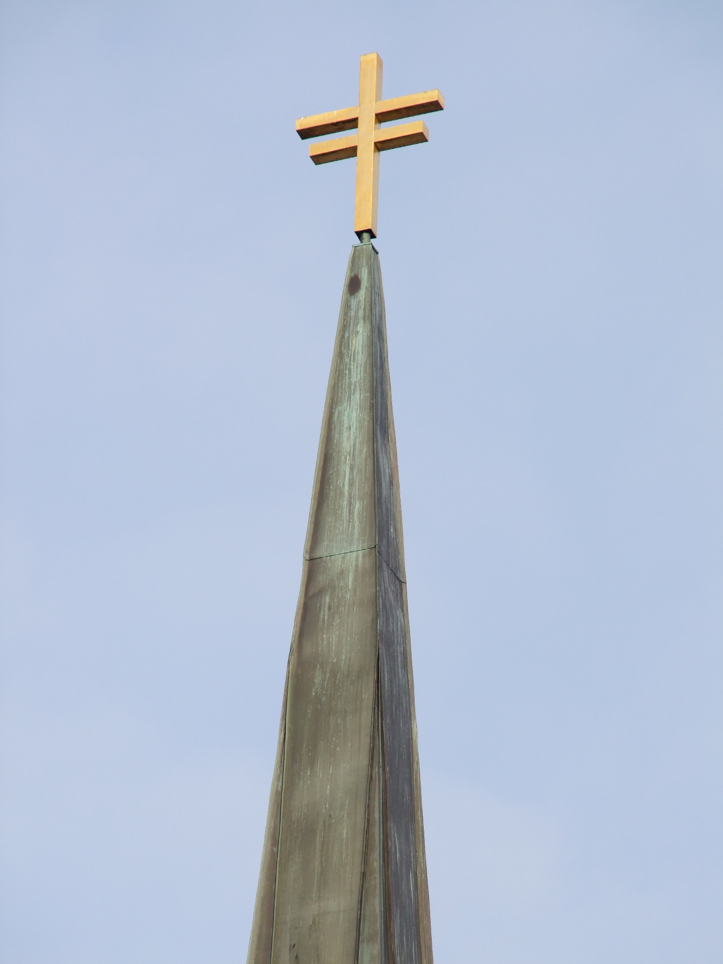 Die Turmspitze der Christuskirche in Memmingen. Das Doppelkreuz soll die lettische Gemeinde symbolisieren, aus welcher die Gemeinde hervorging.